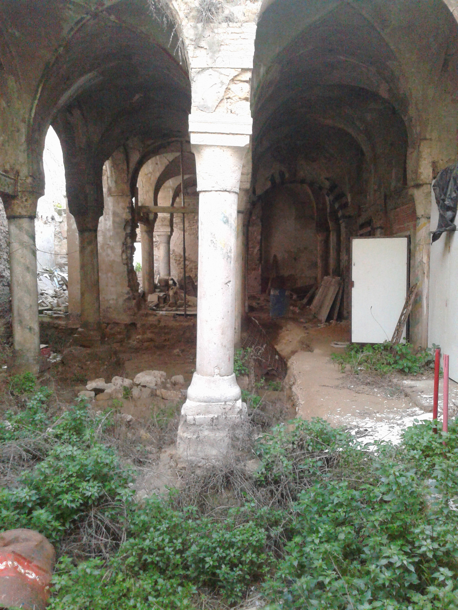 Ancienne dar mrabet